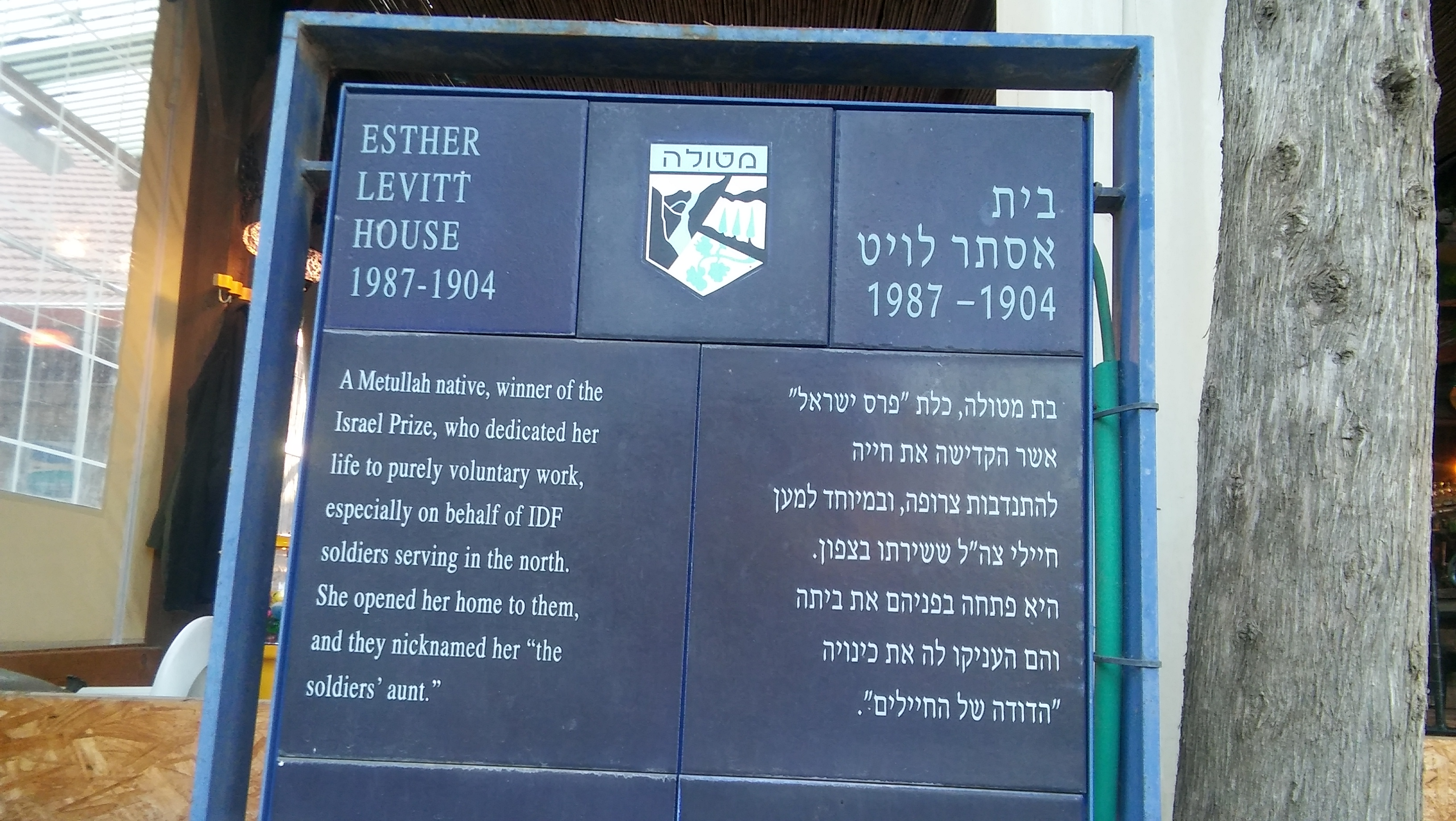 מטולה - רחוב הראשונים - בית אסתר לויט - לוח